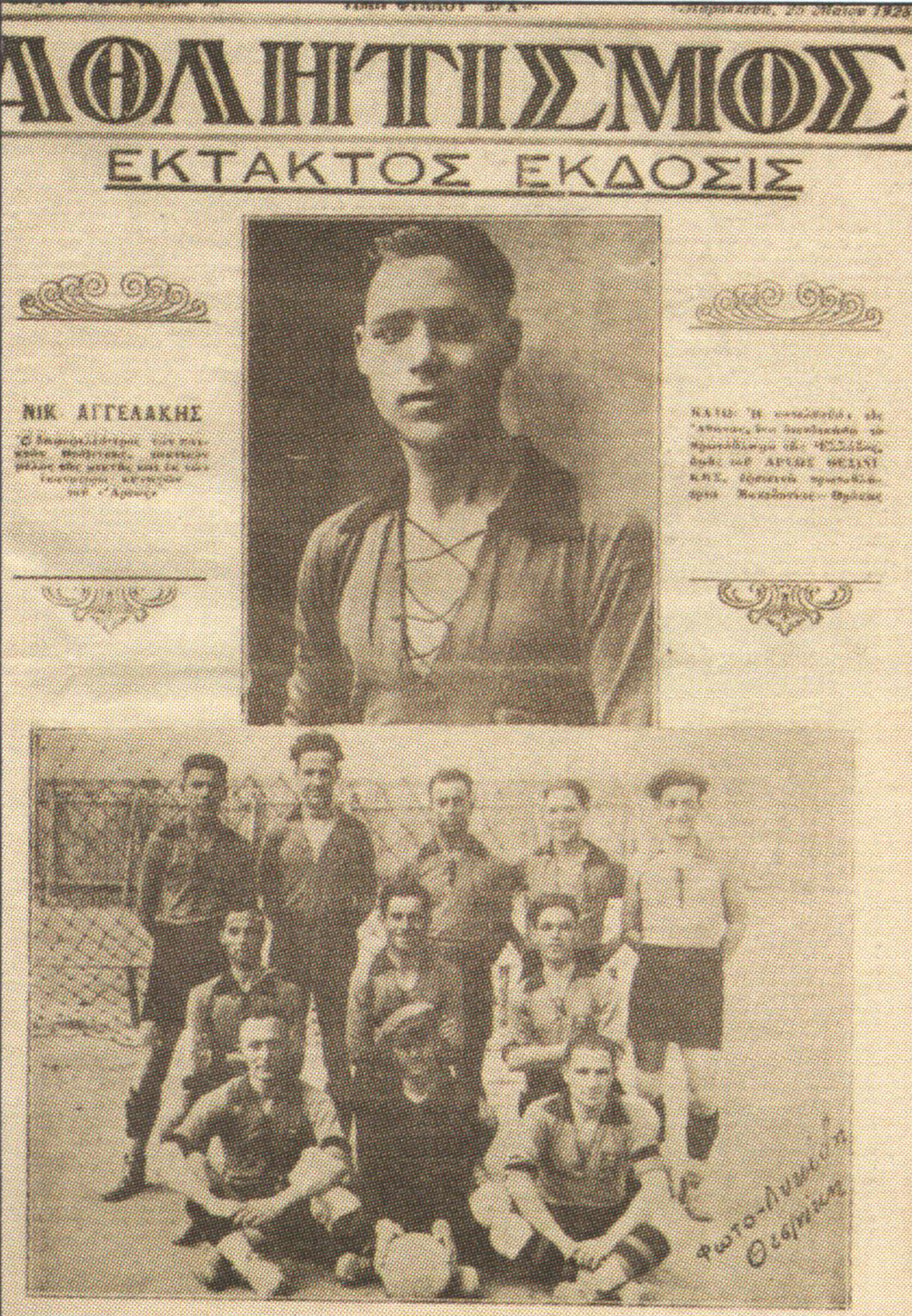 To εξώφυλλο του περιοδικού Αθλητισμός, τεύχος 48, 25 Μαΐου 1928 αφιερωμένο στον πρωταθλητή Άρη